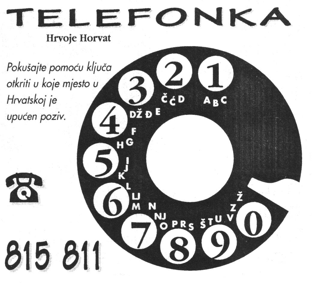 Telefonka, vrsta zagonetke